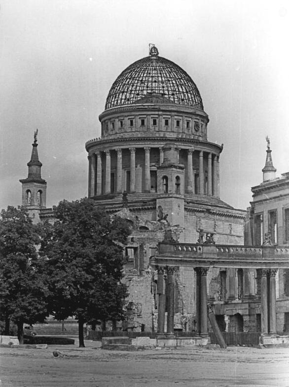 Zentralbild-Dörries Qua-Qu 24.8.1956 Richtkrone auf der Potsdamer Nikolai-Kirche Am 22.8.1956 wurde die Richtkrone über der Stahlkuppel der Potsdamer Nikolai-Kirche aufgezogen. Das 18 Meter hohe Stahlgerüst, das einen Durchmesser von etwa 50 Metern hat, war in dreimonatiger Arbeit montiert worden. Für den Wiederaufbau der 1945 durch einen Terrorangriff anglo-amerikanischer Bomber zerstörten Kirche hat die Regierung bisher 140000 DM zur Verfügung geestellt. Bis 1960 sind weitere 325000 DM an staatlichen Zuschüssen vorgesehen. UBz. Die Nikolaikirche mit der neumontierten Kuppel.